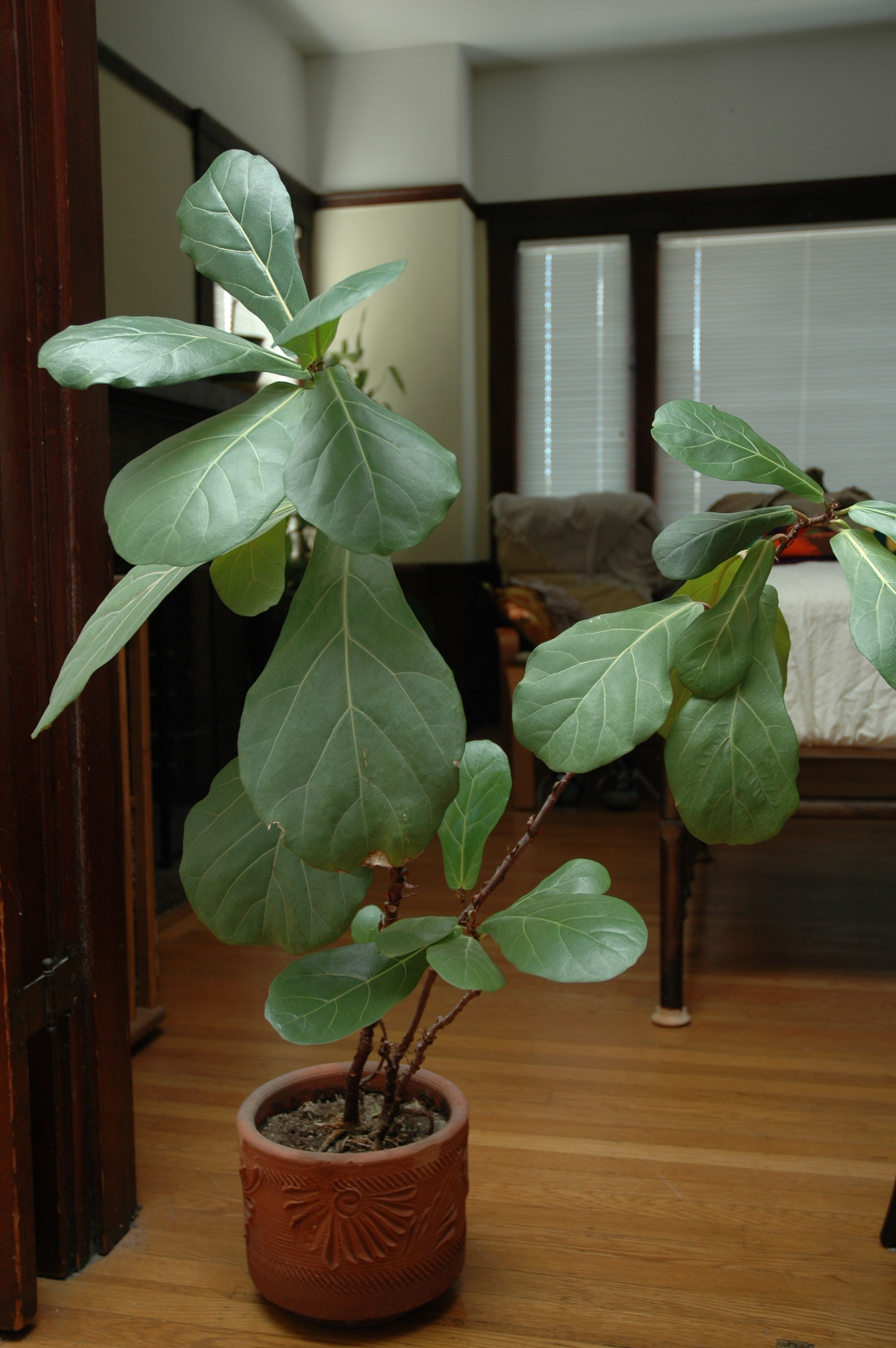 Ficus lyrata, fiddleleaf fig.